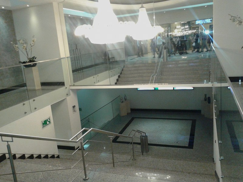 Interior del hotel gran palace, centro de convenciones. Aquí se ubican el mural "sol" y "luna" de Nemesio Antúnez